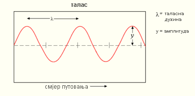 Приказ таласне дужине.